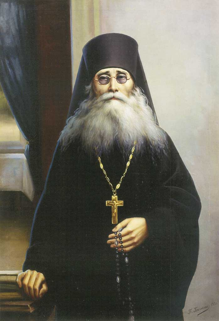 Портрет преподобного Варсонофия (Плиханкова), старца Оптиной пустыни.